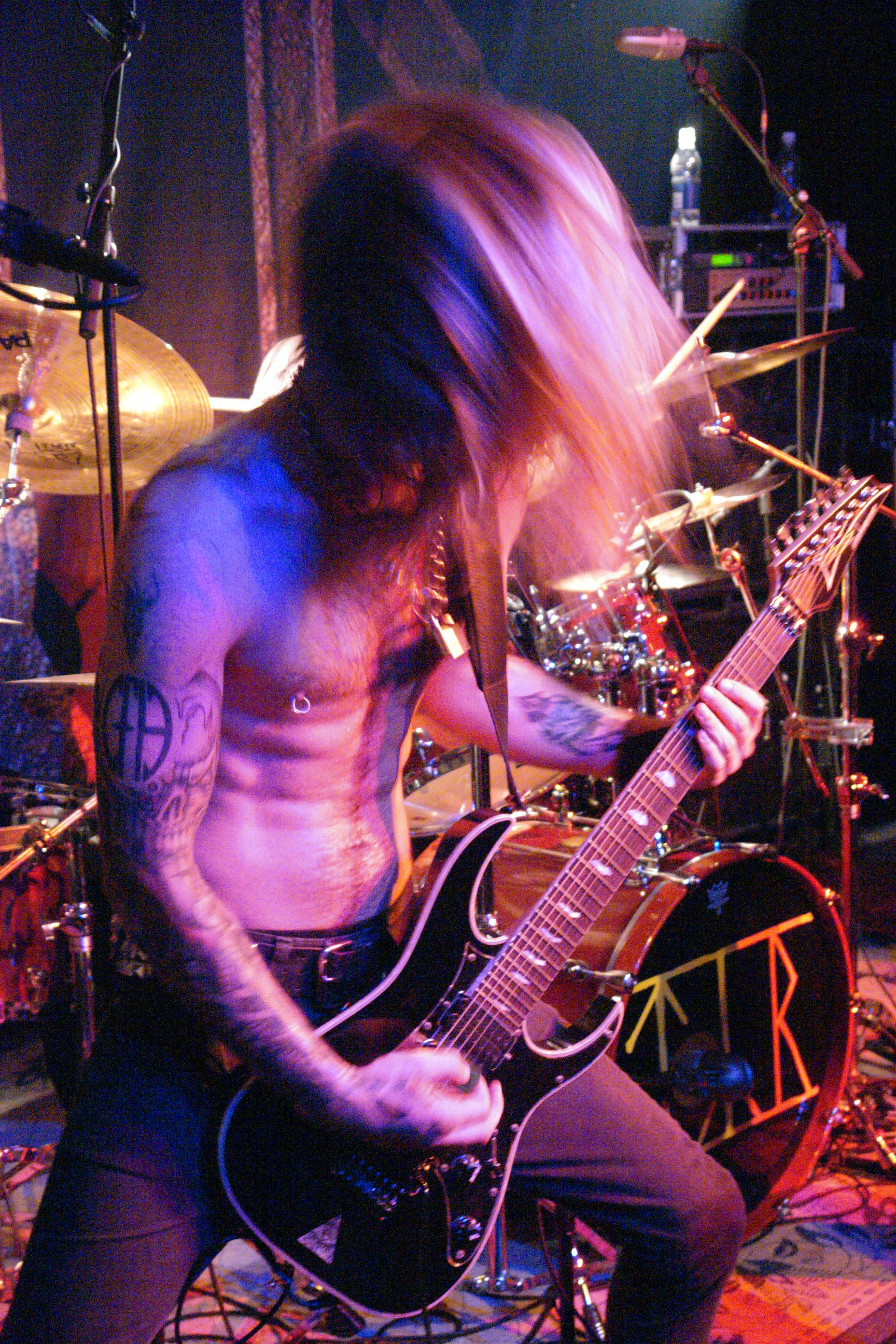 Faroese Viking Metal band Týr in Copenhagen